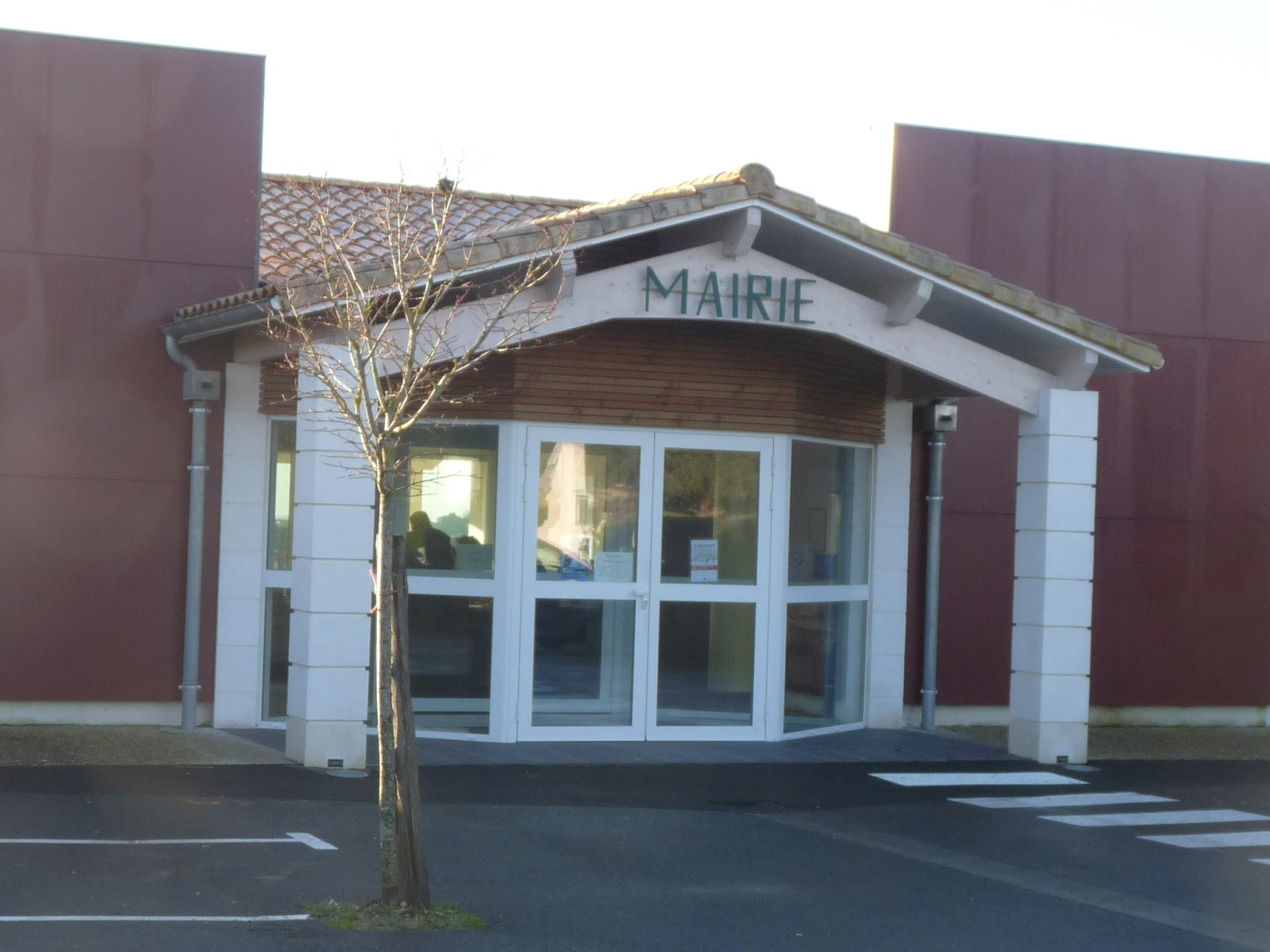 Mairie de Coux, Charente-Maritime, France